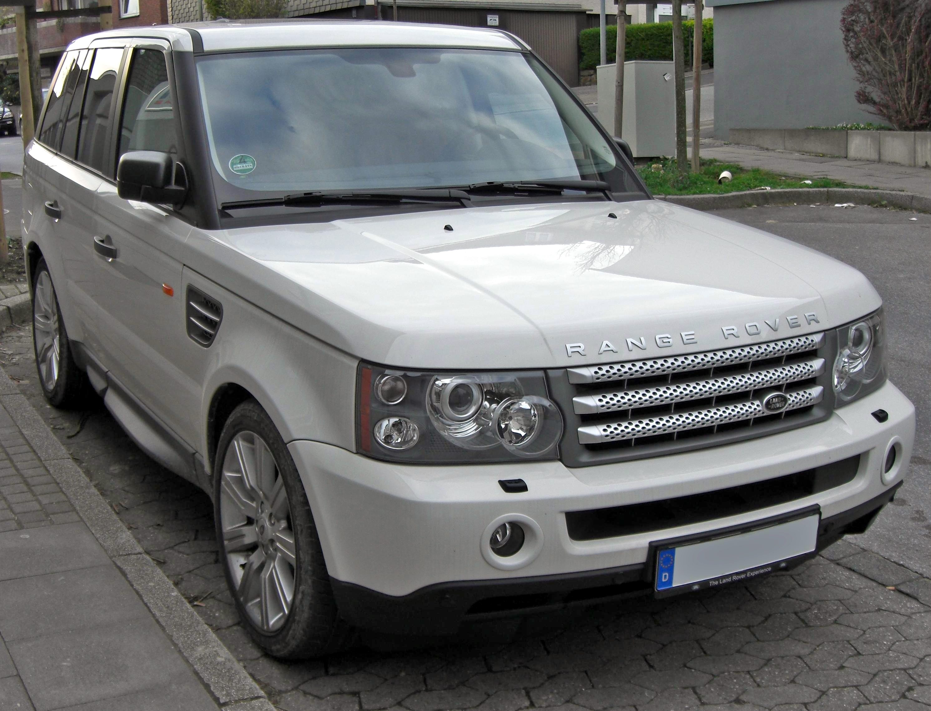 Range Rover Sport